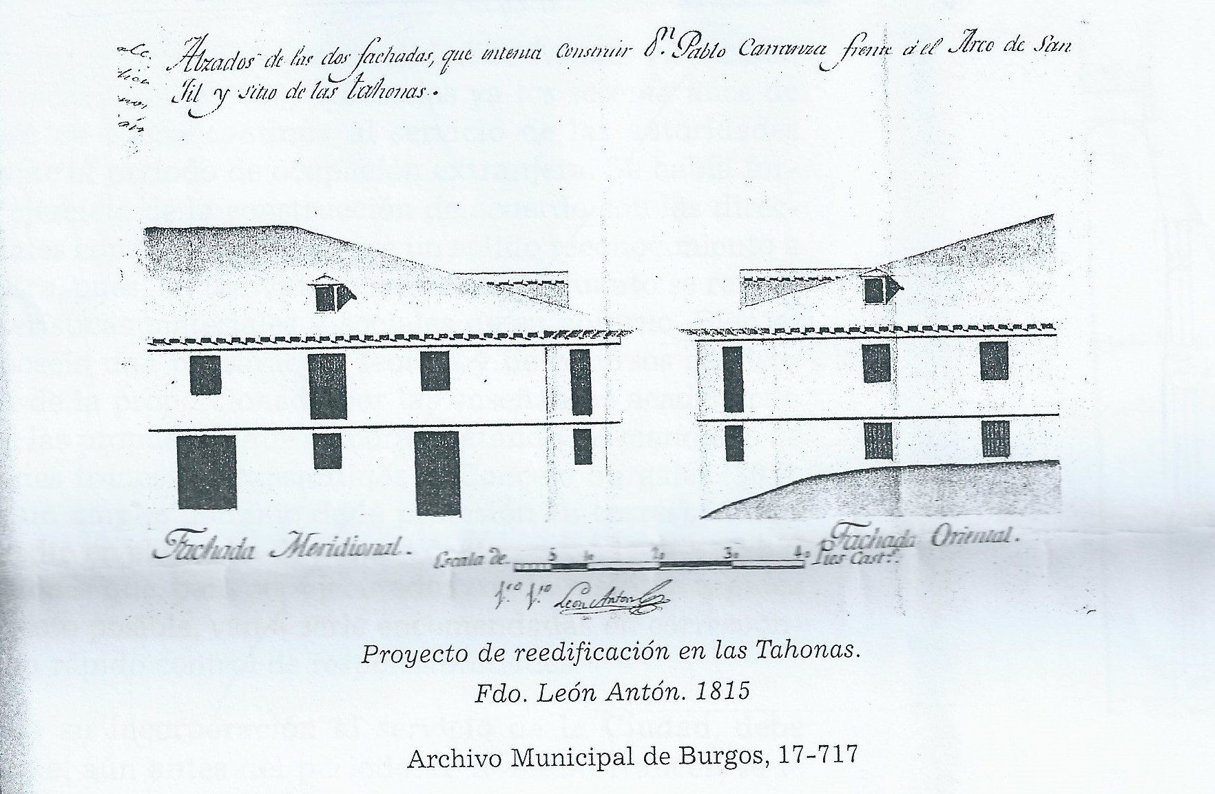 boceto realizado por León Antón, para una de sus obras de redificación de la ciudad de Burgos